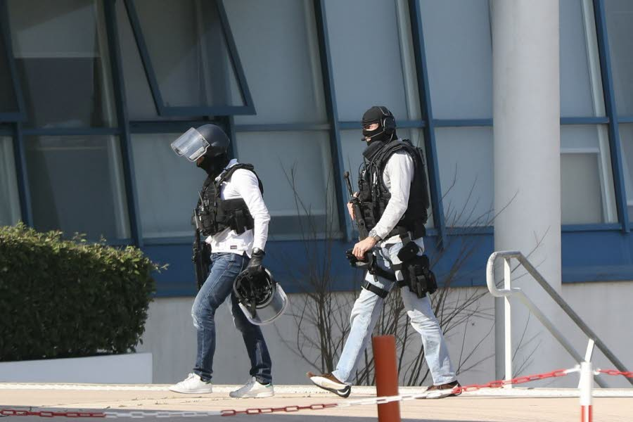 2 membre du RAID patrouillant près du lycée de Grasse, là où une fusillade a éclatée.